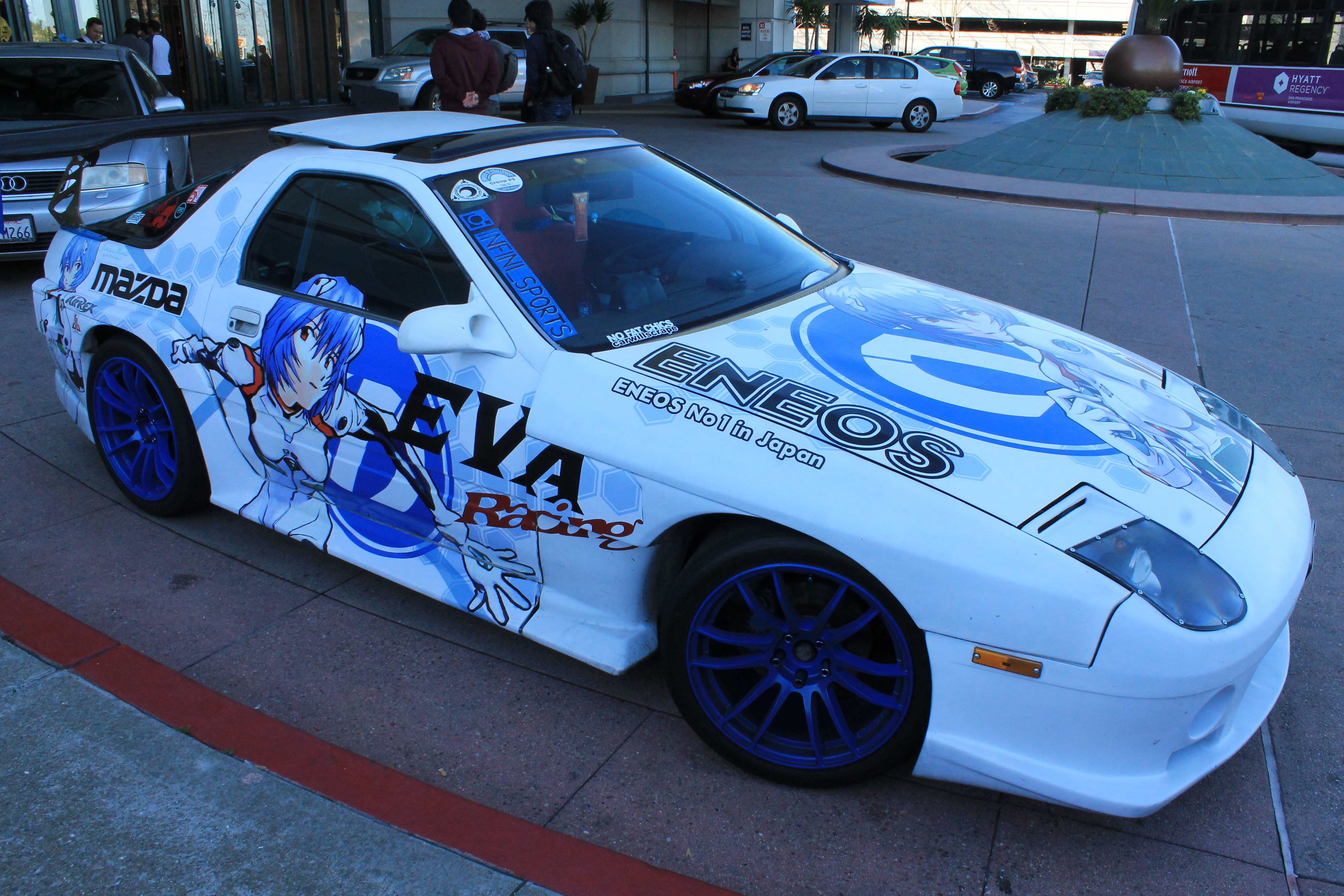 中文（台灣）: Animation on Display 2015，《新世紀福音戰士》綾波零彩繪痛車。